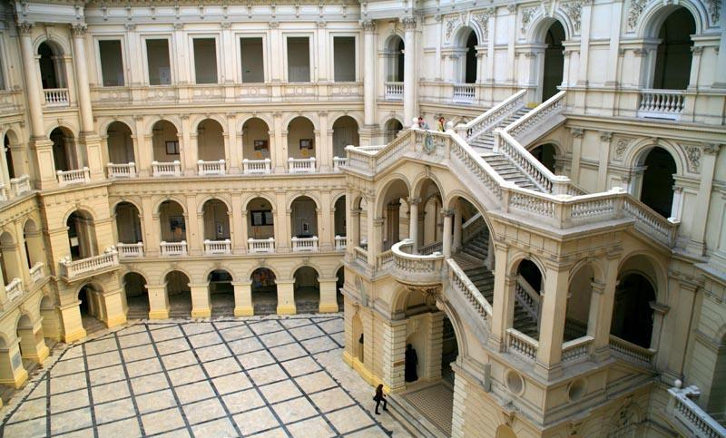 Warszawa (Polska)